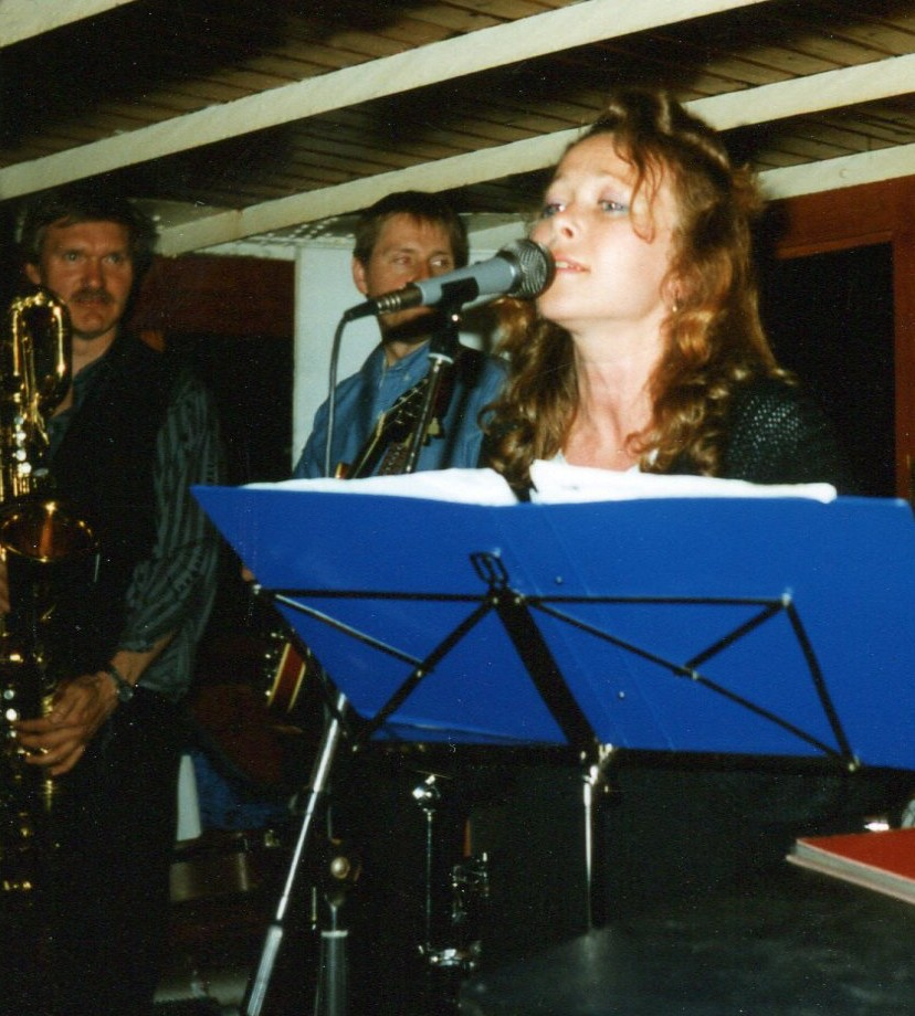 Sångare Lena Andersson med "Slims Bluesgäng" på S/S Blidösund den 11 juni 1987